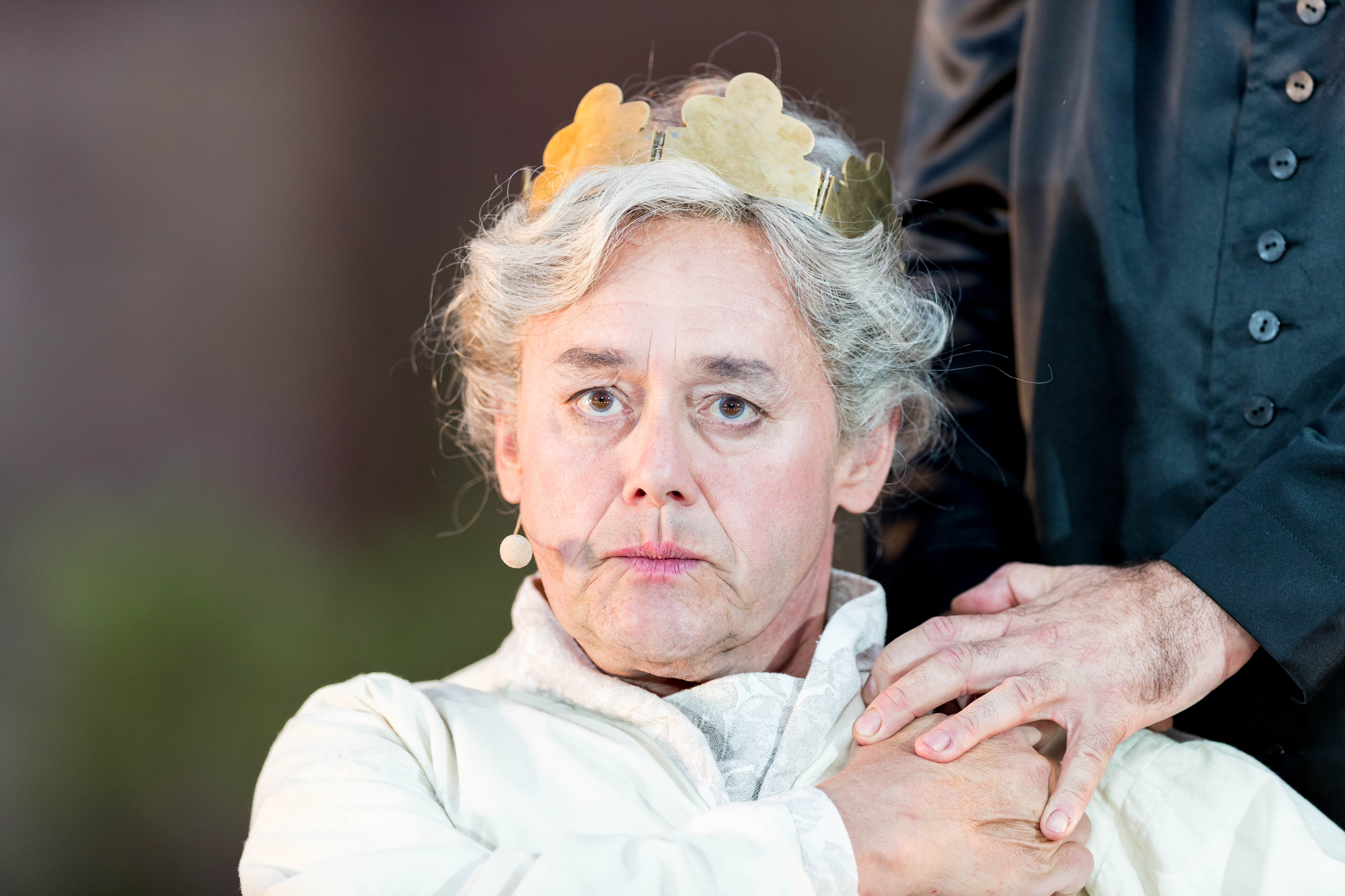 Wolfgang Pregler during Nibelungenfestspiele "Siegfrieds Erben" at Wormser Dom, Worms, Rheinland-Pfalz, Germany on 2018-07-19, Photo: Sven Mandel